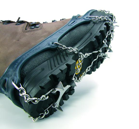 moderne Kombination aus Spikes und Schneeketten